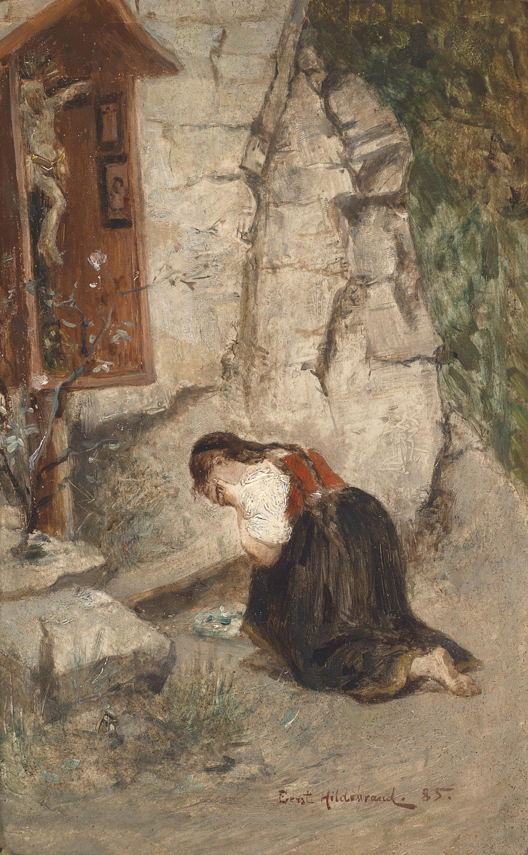 Verzweiflung, signiert, datiert Ernst Hildebrand (18)85, Öl auf Holz, 20 x 12 cm